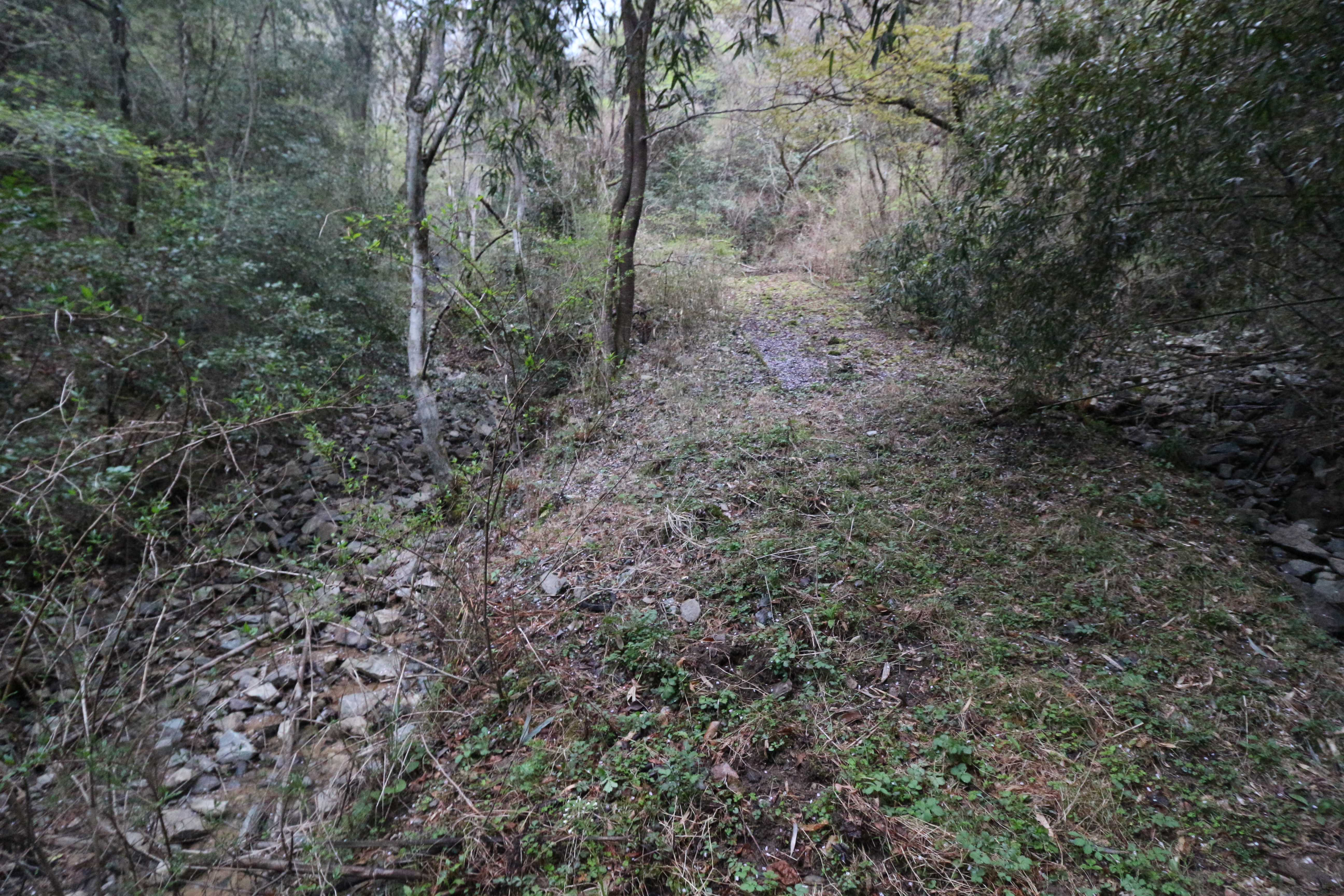 広島県福山市芦田町の大谷砂留。渓流Cの2基目のコンクリート製砂防ダムの上流で左右に係留が分かれる部分。中央に山道があるが、山道は右側の渓流に沿う。左側の渓流には道はない。